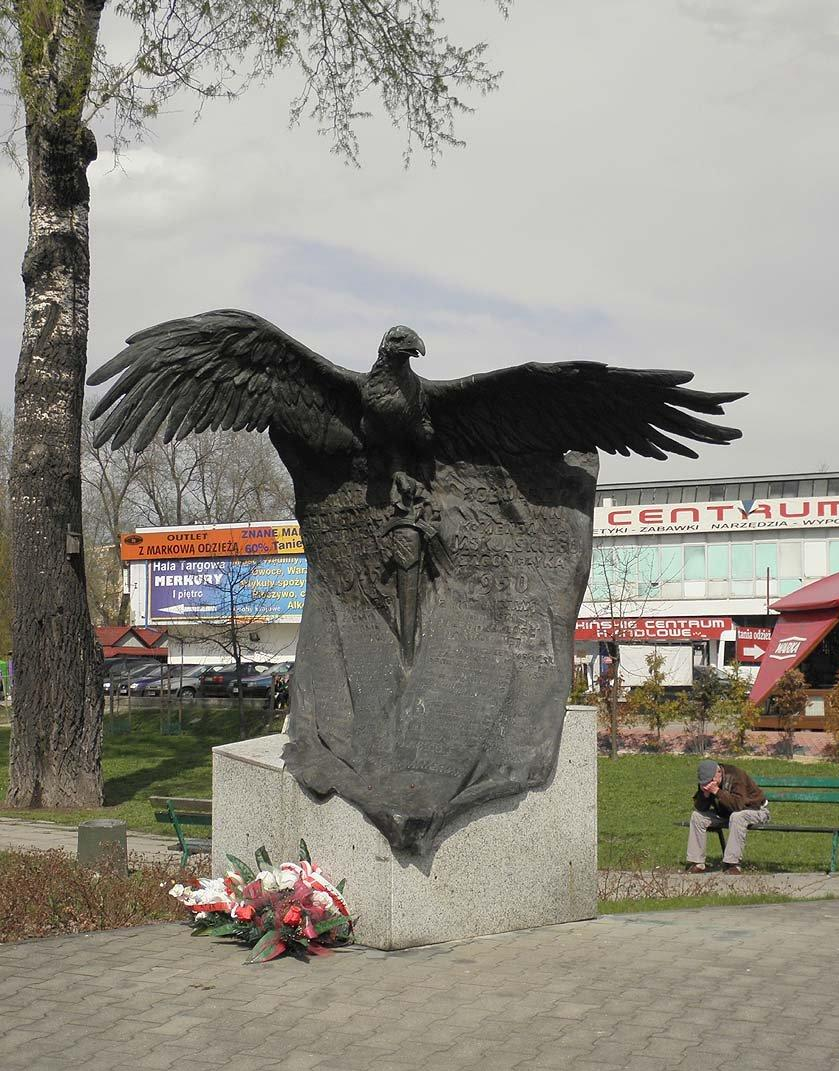 Pomnik upamiętniający żołnierzy zgrupowania WiN.